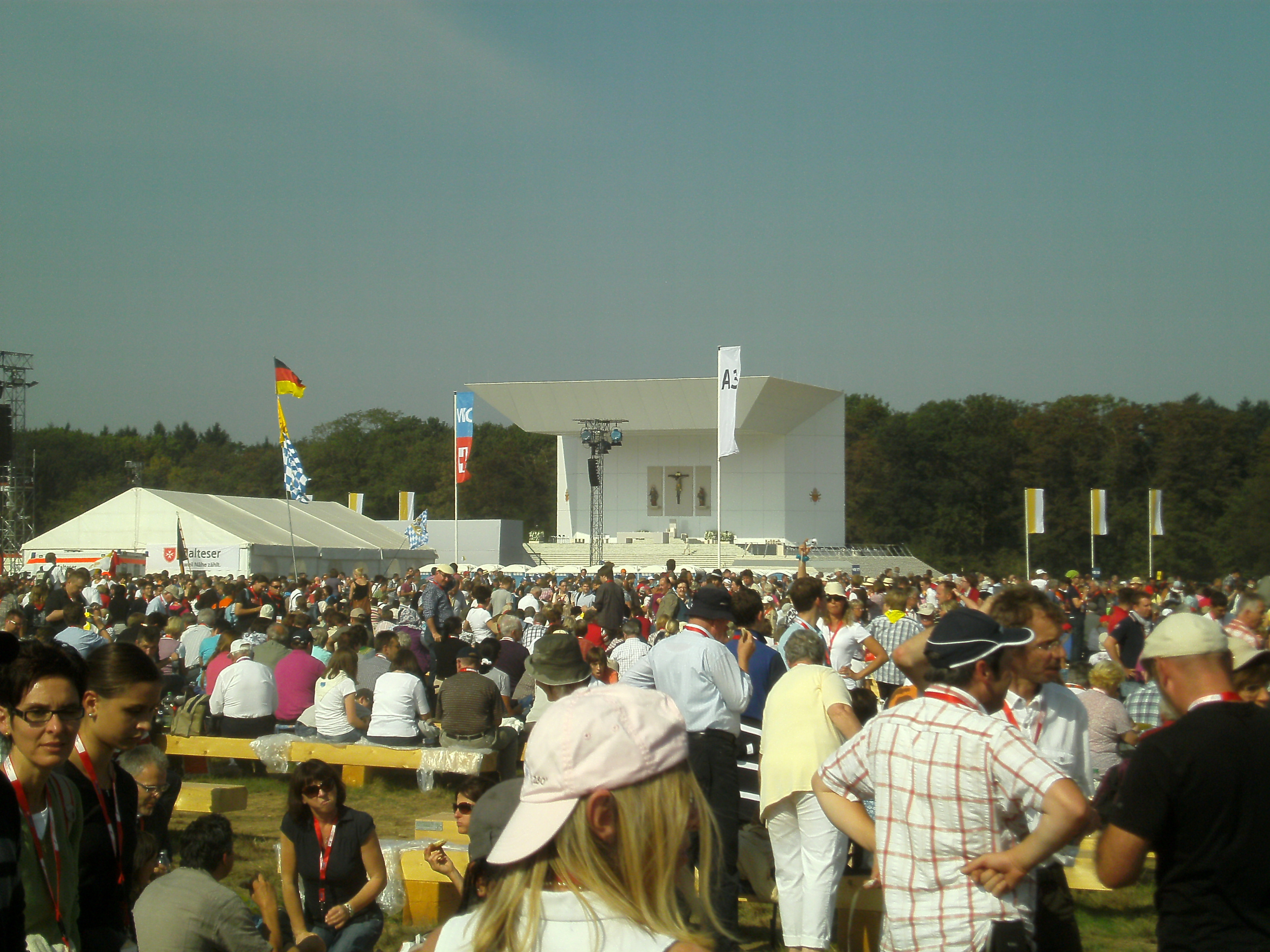 Papst Benedikt XVI. in Freiburg